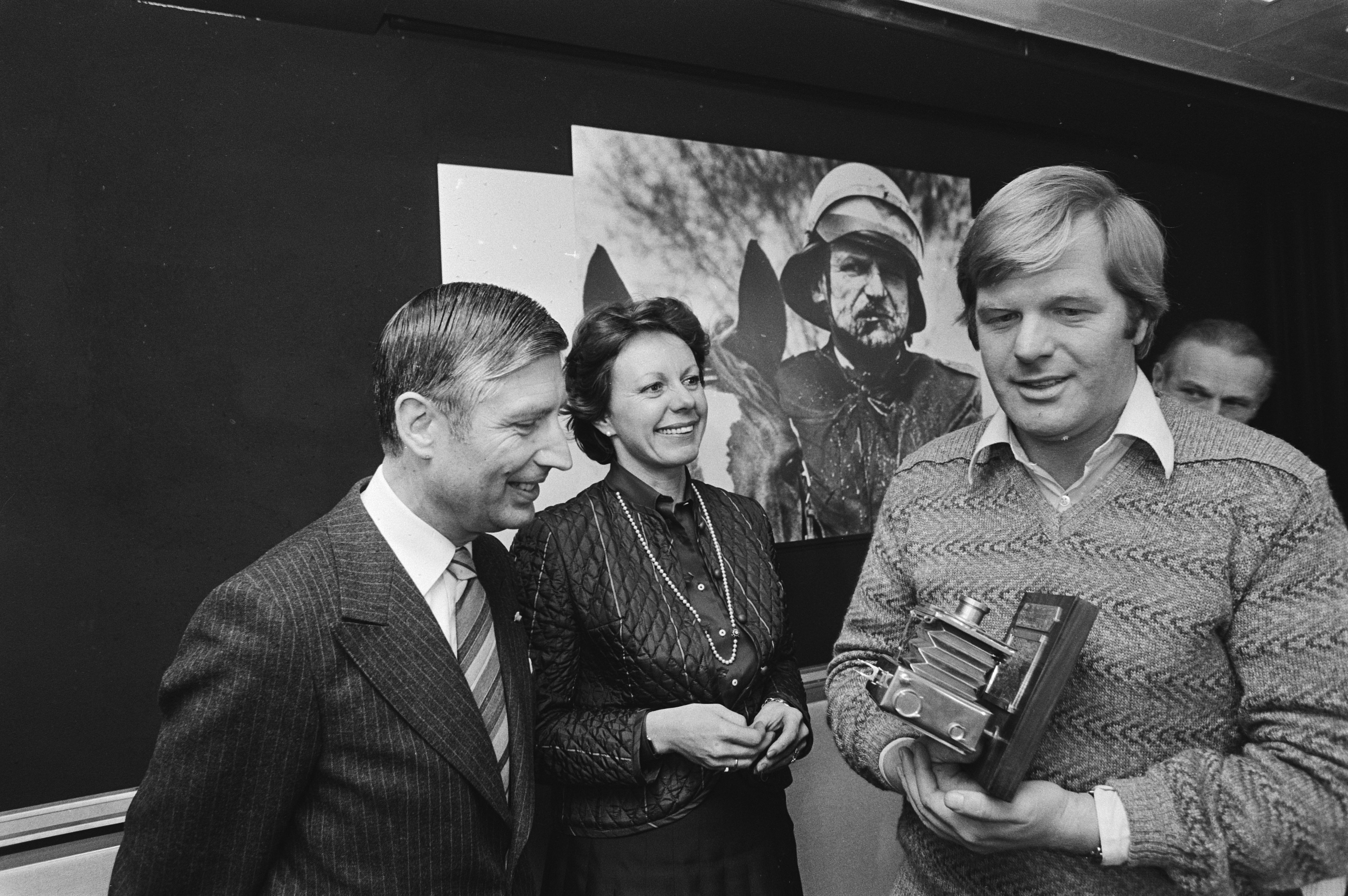 Collectie / Archief : Fotocollectie Anefo Reportage / Serie : [ onbekend ] Beschrijving : Uitreiking Zilveren Camera door Premier Van Agt op Schiphol aan ANP-fotograaf Paul Stolk ,van Agt Smit-Kroes en Paul Stolk met Datum : 18 december 1980 Locatie : Noord-Holland, Schiphol Trefwoorden : Uitreikingen Persoonsnaam : Agt, Dries van, Stolk, Paul Fotograaf : Dijk, Hans van / Anefo Auteursrechthebbende : Nationaal Archief Materiaalsoort : Negatief (zwart/wit) Nummer archiefinventaris : bekijk toegang 2.24.01.05 Bestanddeelnummer : 931-2193